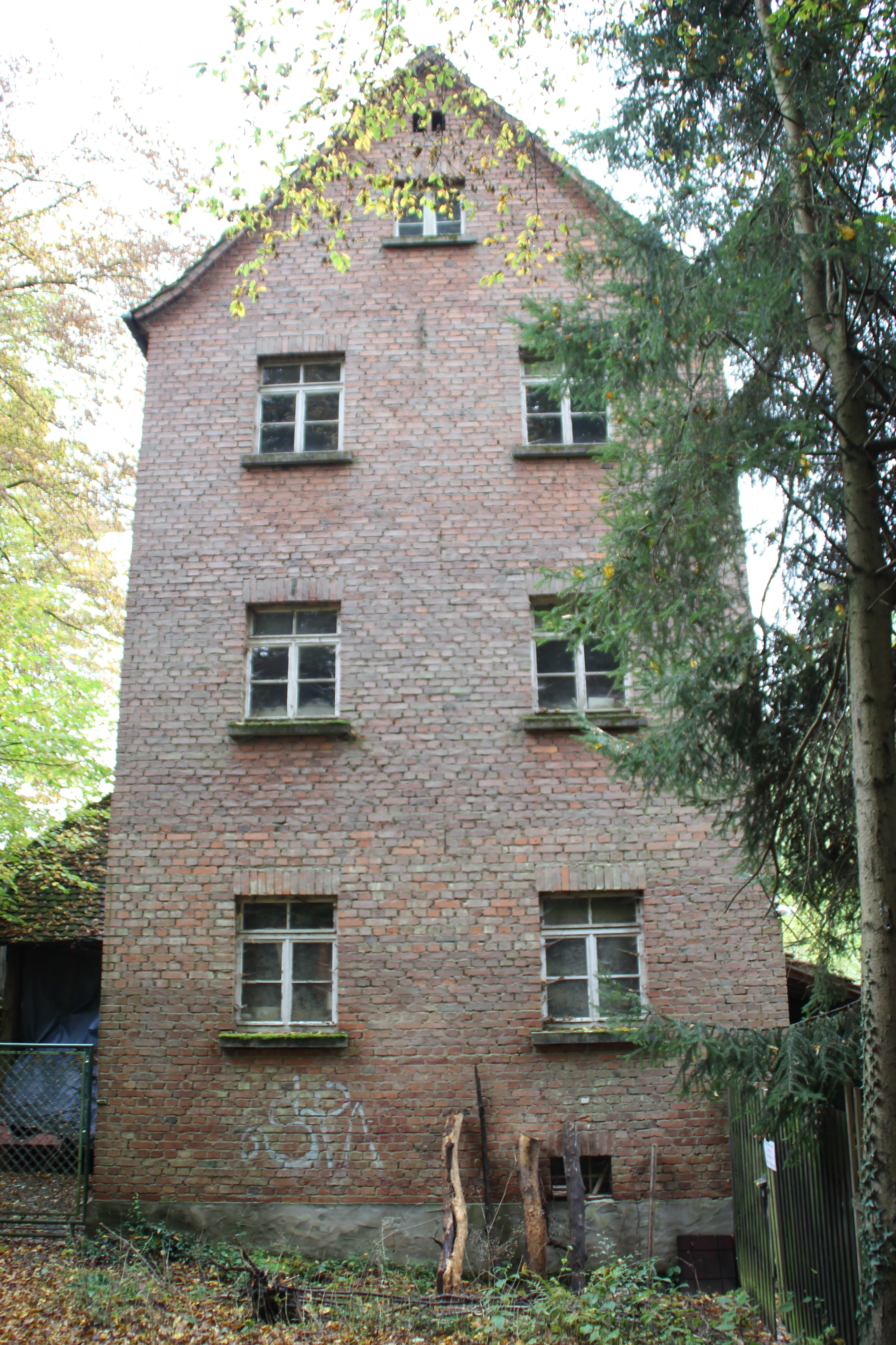 Das Mühlgebäude der Hellethalsmühle im Jahr 2019